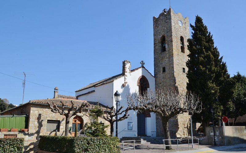 Església parroquial de Sant Vicenç de Vallromanes (Vallromanes)